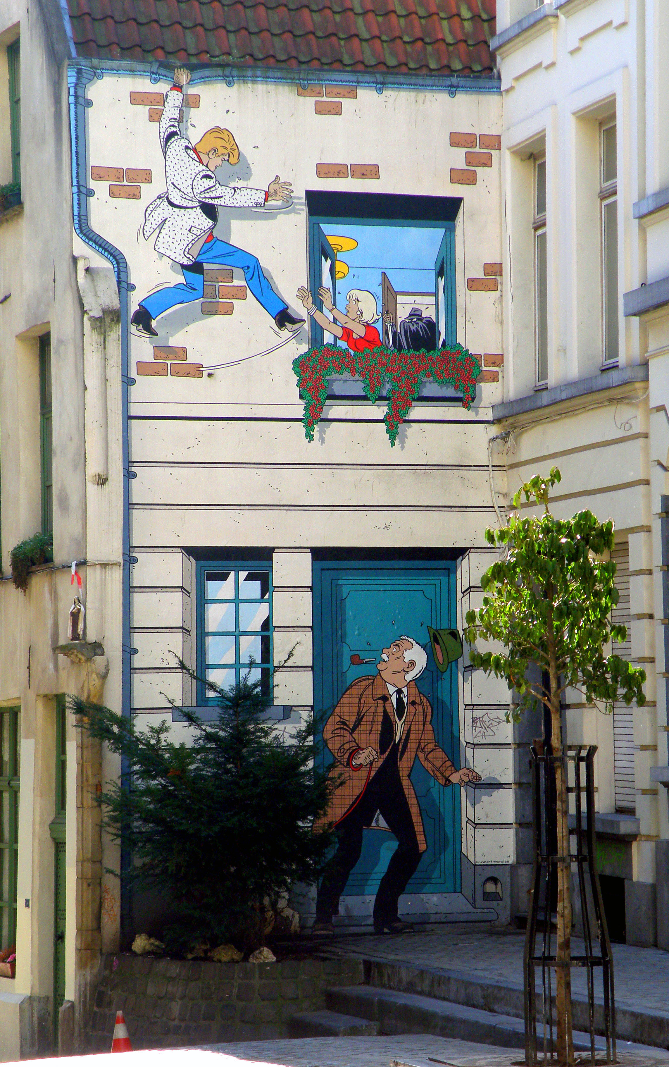 Ric Hochet-Wandgemälde in der Rue des Bons Secours in Brüssel (Parcours bande dessinée)[1]